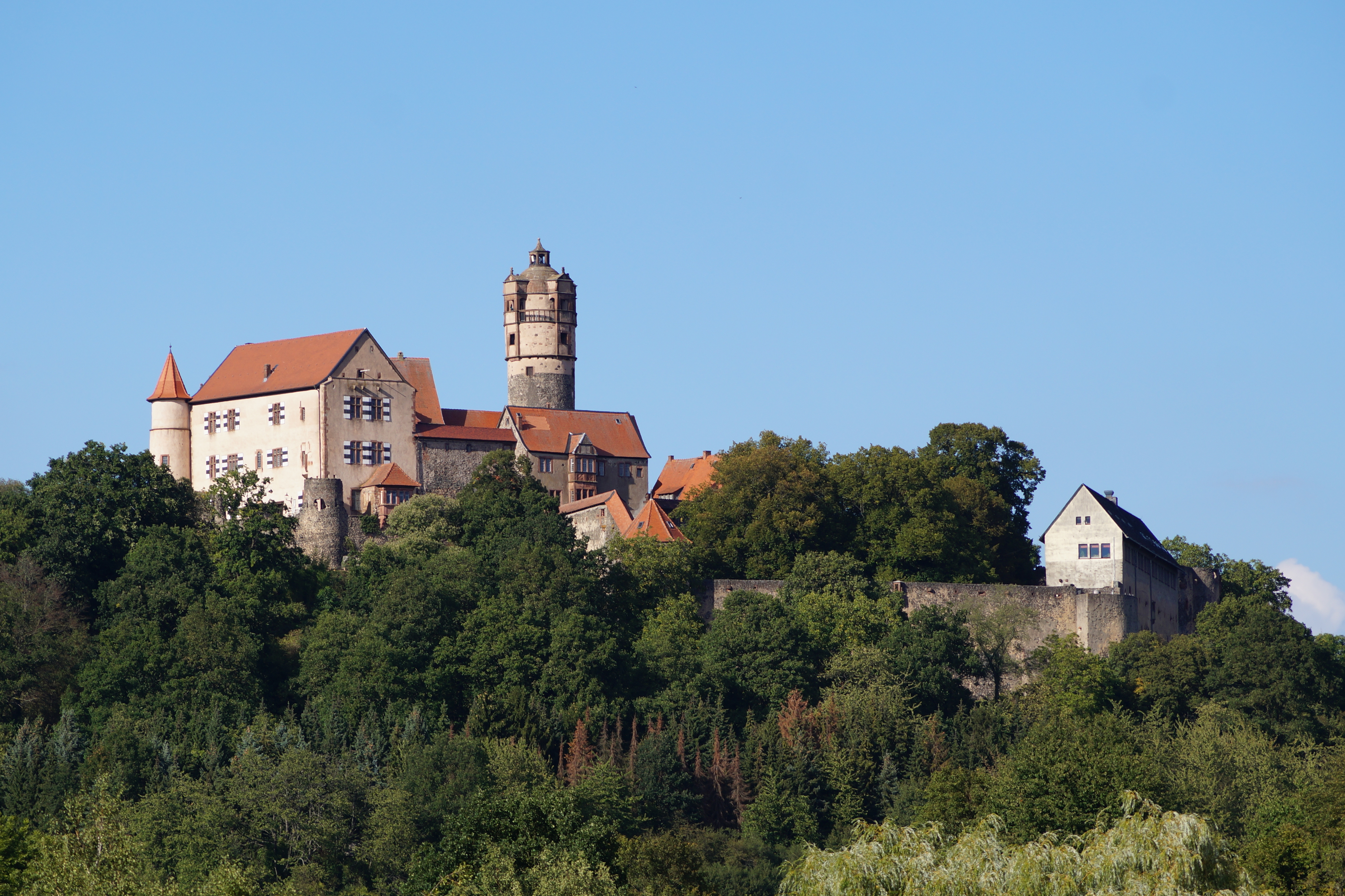 Burg Ronneburg, Gemeinde Ronneburg in Hessen Ansicht, von Südwesten.